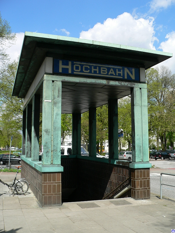 Eingang U-Bahnhof Klosterstern 1929-1930, Architekt: Karl Schneider, Hamburg, 28.4.2005